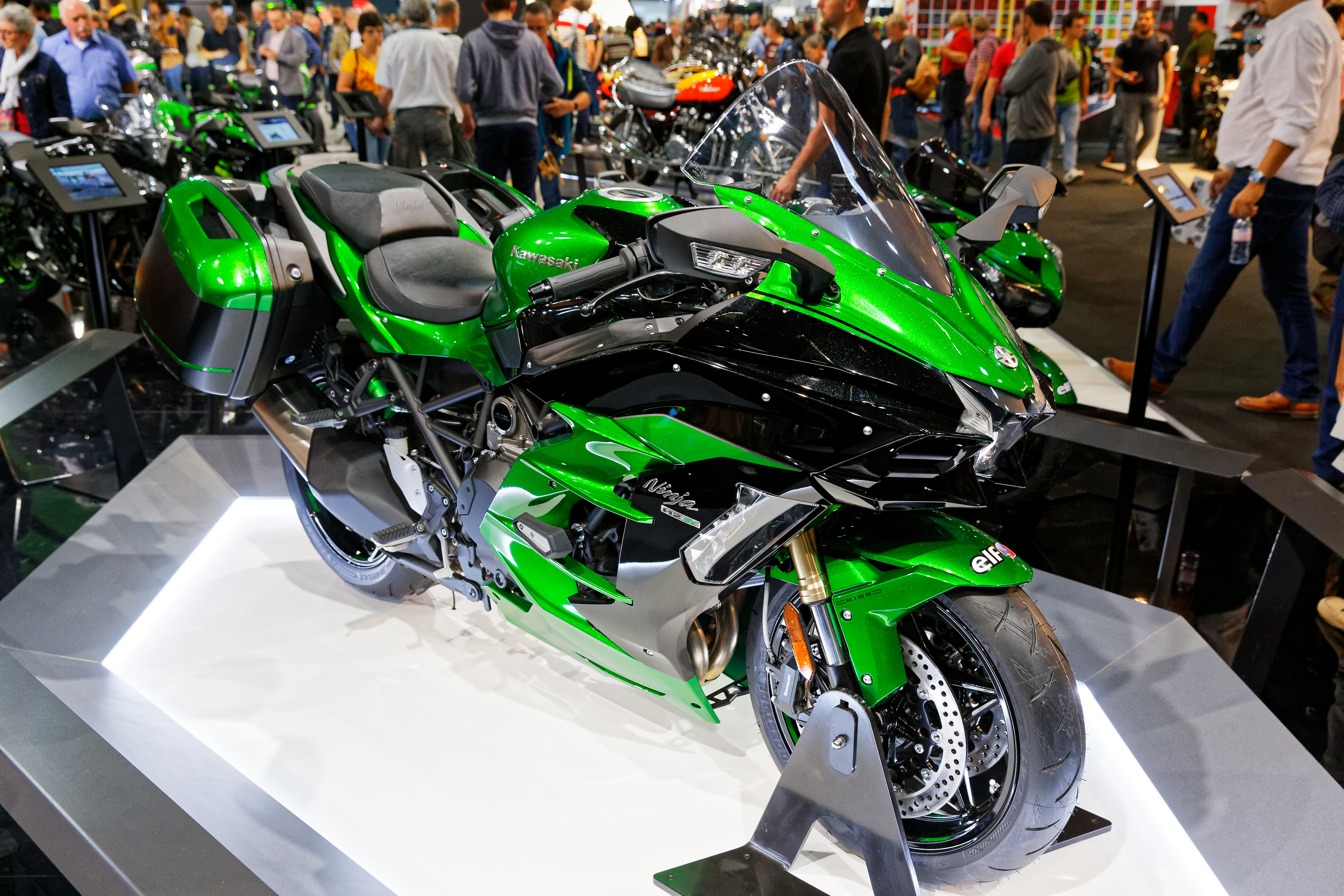 Une Kawasaki Ninja H2 SX exposée lors du mondial de l'automobile de Paris 2018.